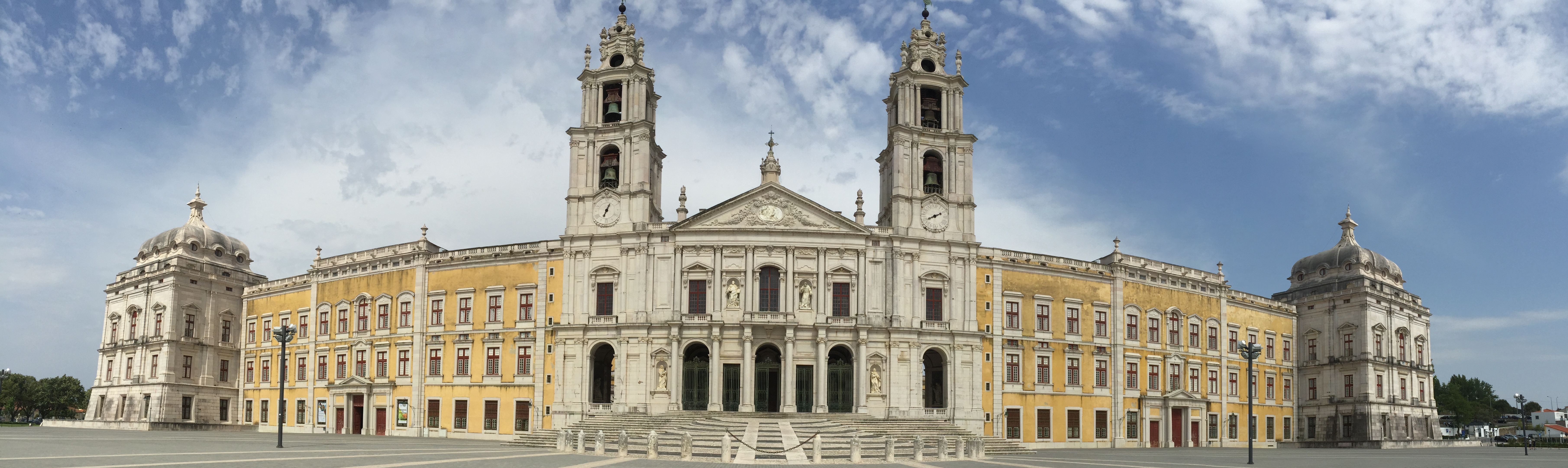 2640 Mafra, Portugal